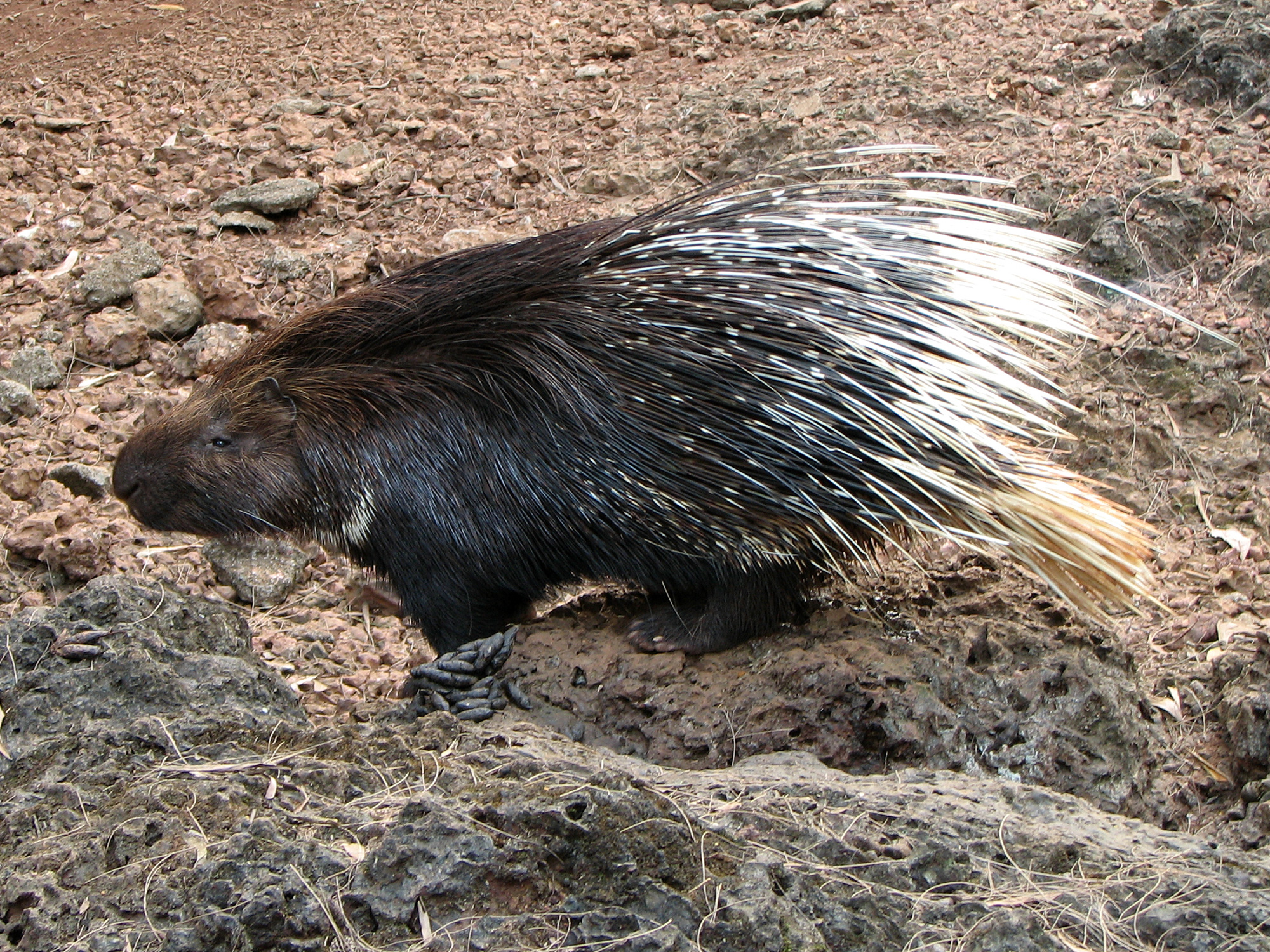 A porcupine